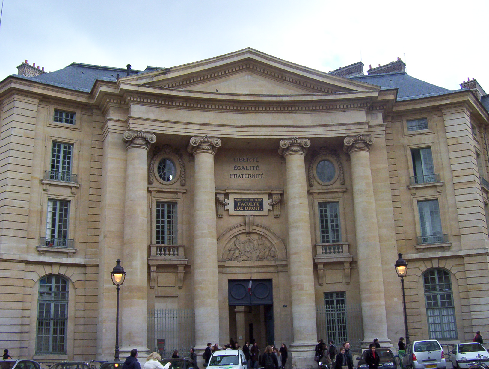 Photo prise par moi-meme en mars 2006 [transferred from